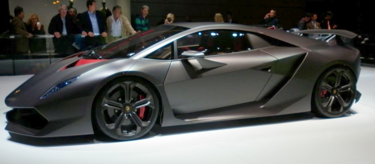 Lambo sesto elemento Paris 2010